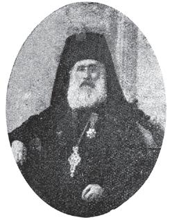 Йона Маджаров.